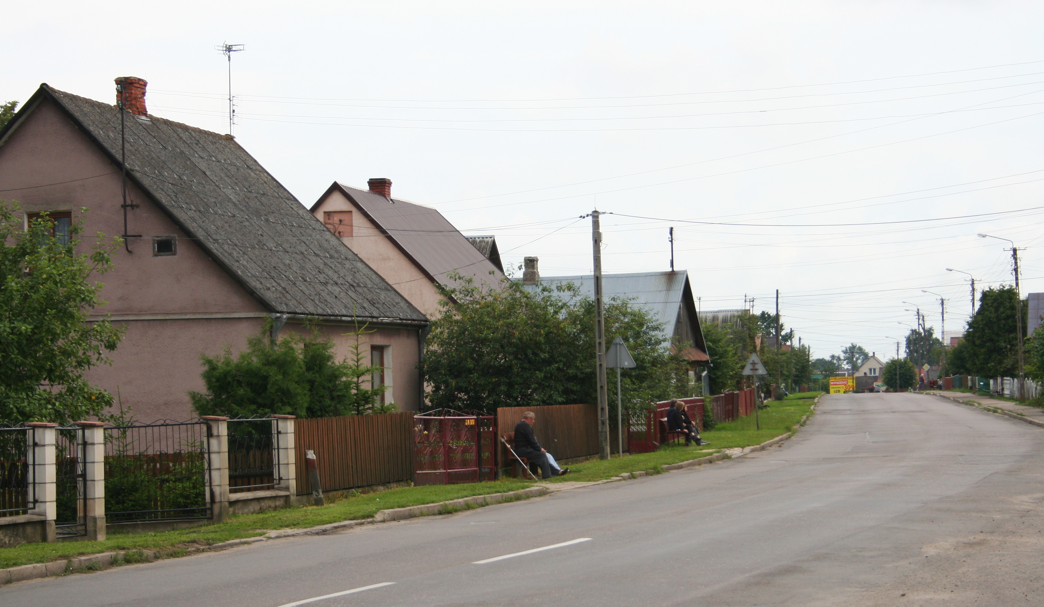 Dubiny, fragment wsi widok spod cerkwi Zaśnięcia NMP